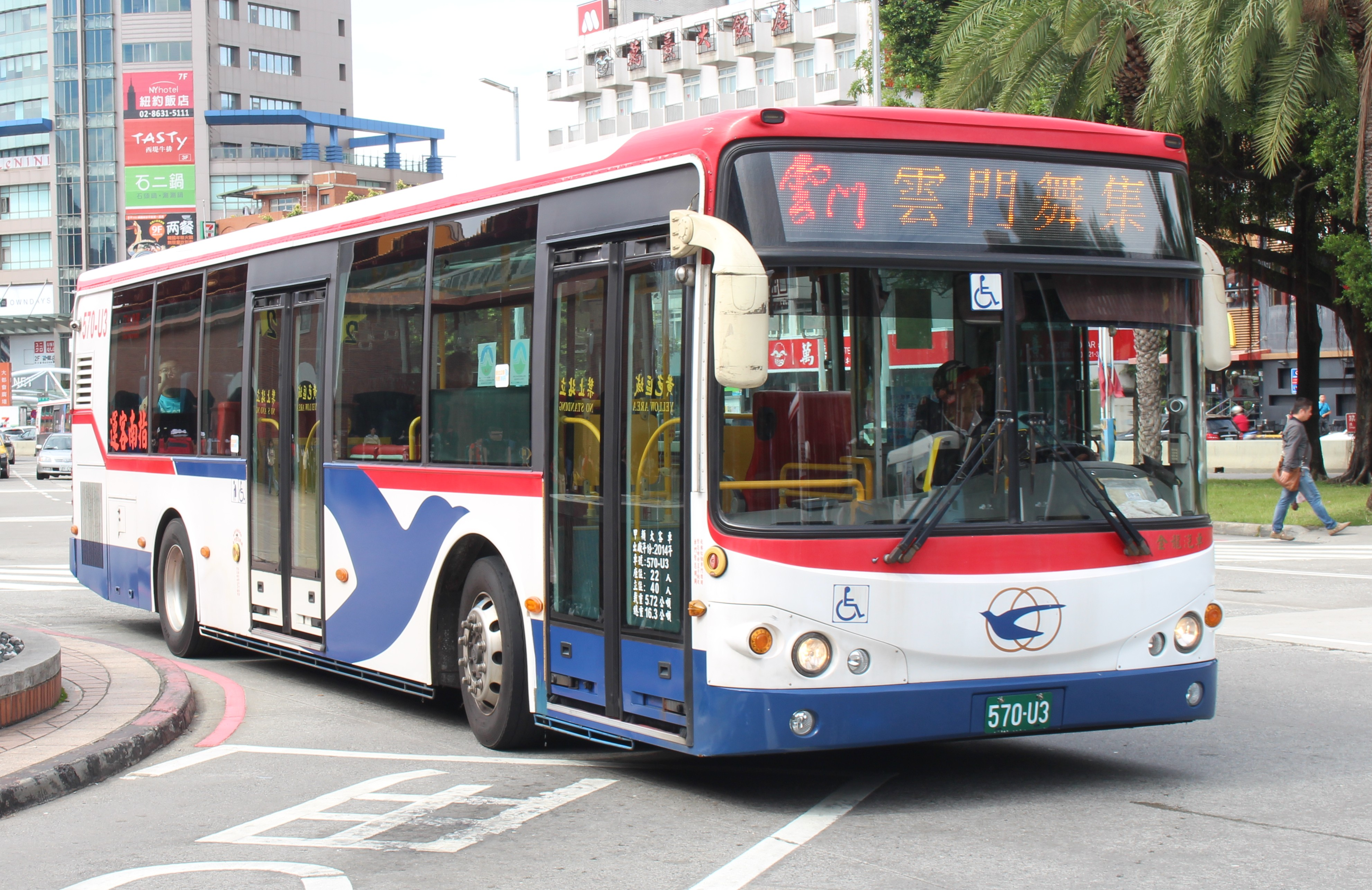 指南客運 2014 KINGLONG KL6112U1 570-U3